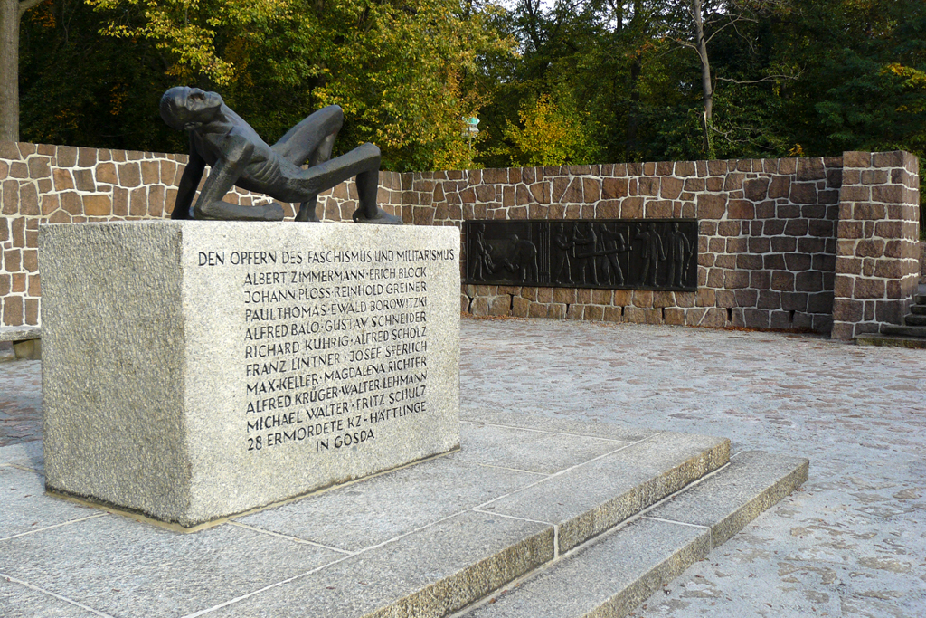 Gedenkstätte "Opfer des Faschismus" auf dem Georgenberg in Spremberg. Diese Gedenkstätte befindet sich direkt unterhalb des Bismarckturmes. Bis 1945 wurden an diesem Ort den Gefallenen des 1. Weltkrieges gedacht!